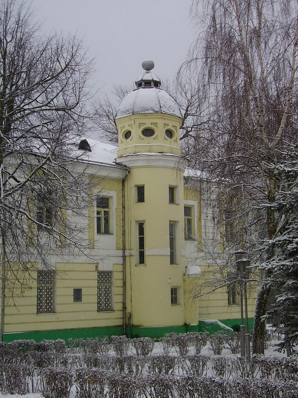 Крупкі. Сядзібны дом